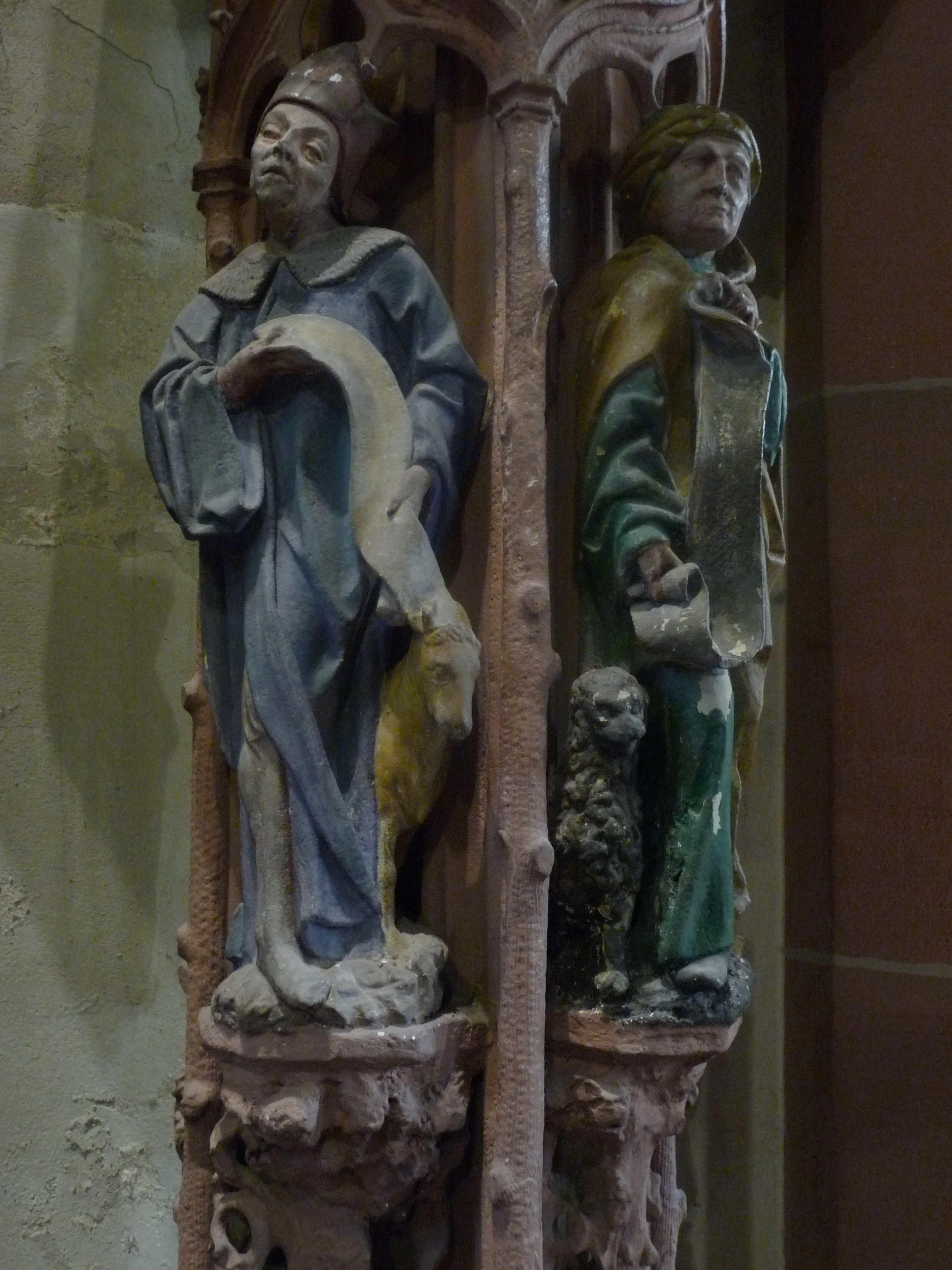 Figuren am spätgotischen Sakramentshäuschen in der Stiftskirche in Baden-Baden (Baden-Württemberg, Deutschland).